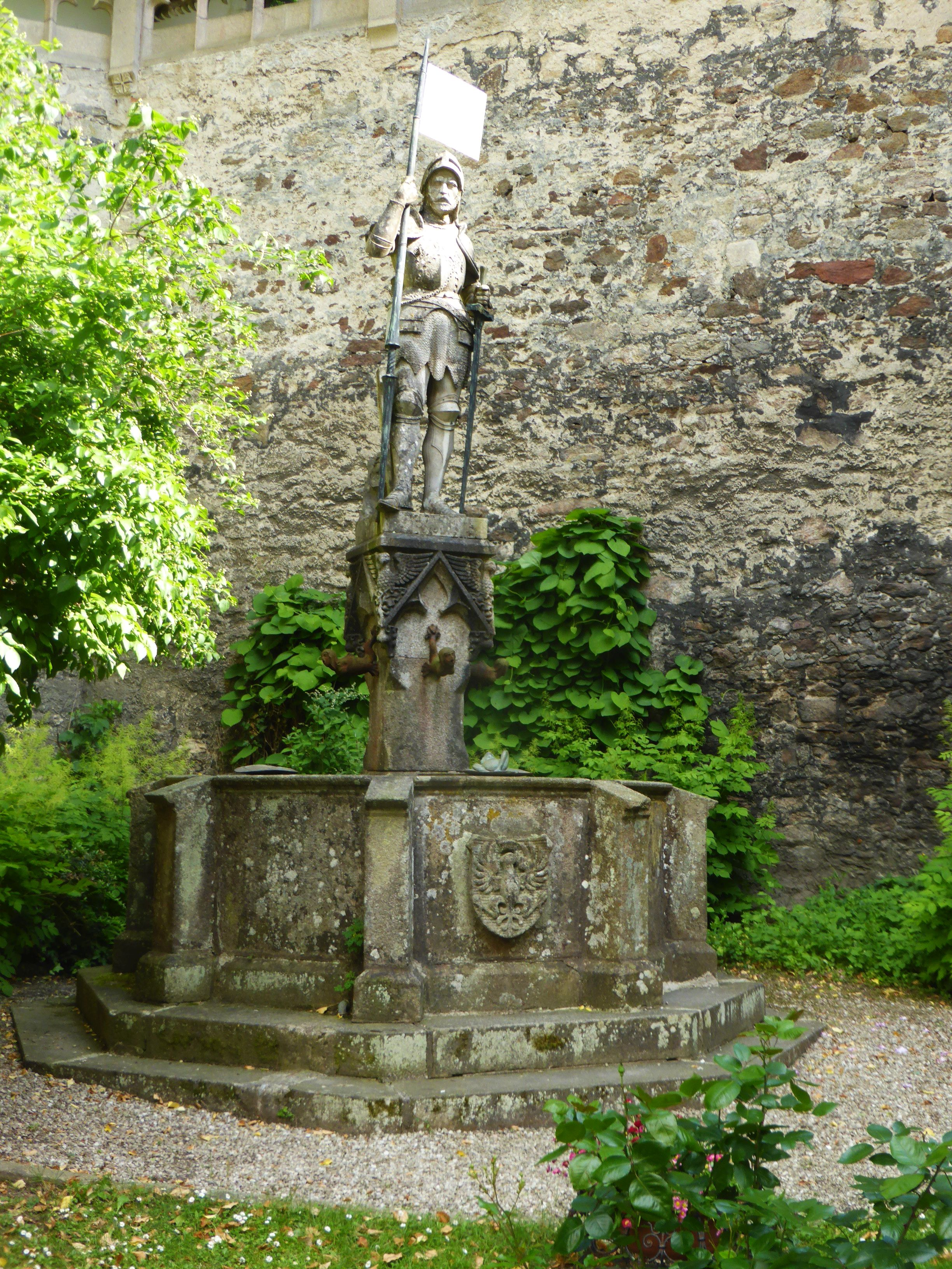 Schloss Egg (Ritter Arrnansberg)